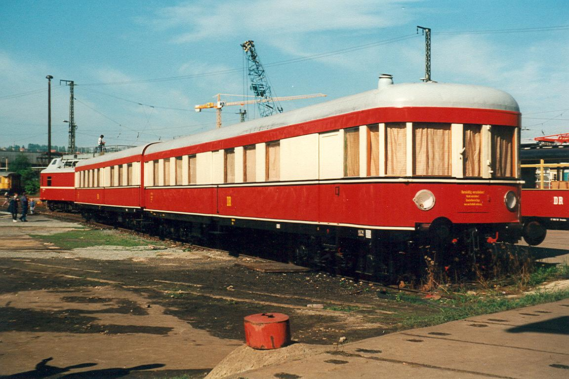 VT 137 367 als Beiwagen 147 551 auf einer Fahrzeugausstellung in Dresden